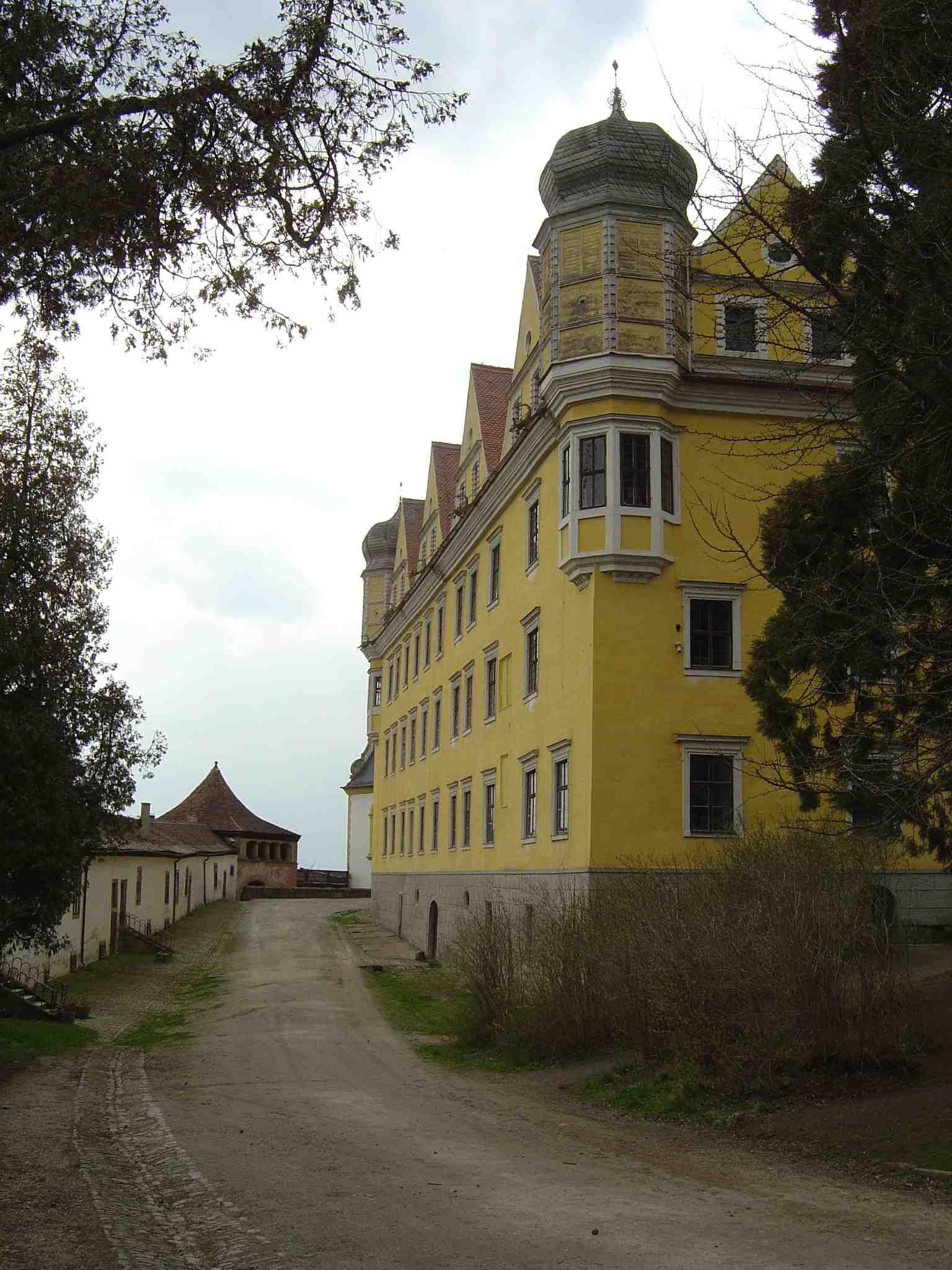 Beschreibung: Schloss Schwarzenberg Franken #2, Scheinfeld, April 2005 Quelle: selbst fotografiert, digital Lizenz: das Bild stelle ich als Public Domain gemeinfrei zur Verfügung